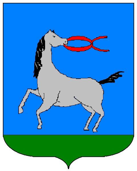 Grb obitelji Kavanjin